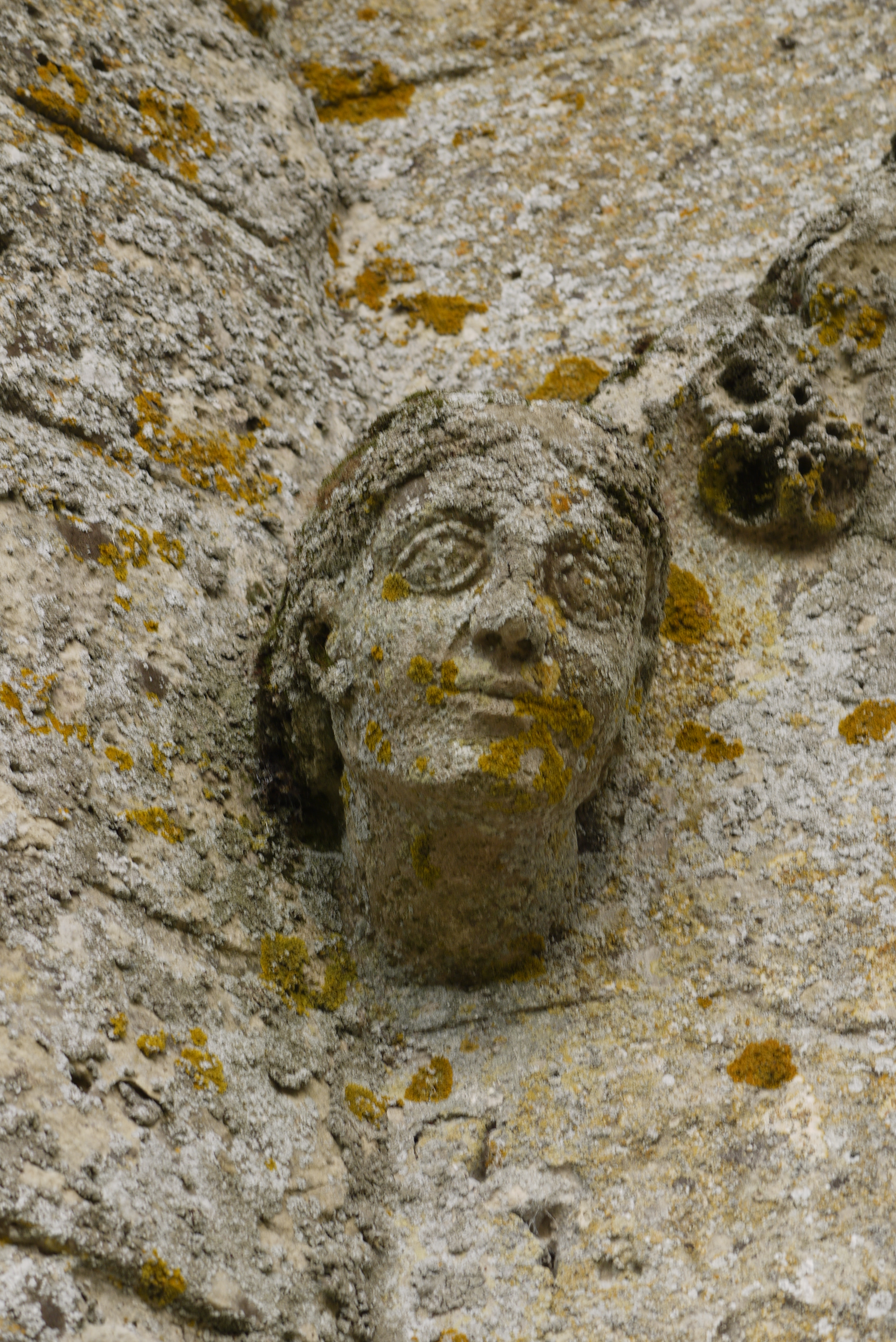 Église Saint-Martin de Marizy-Saint-Mard